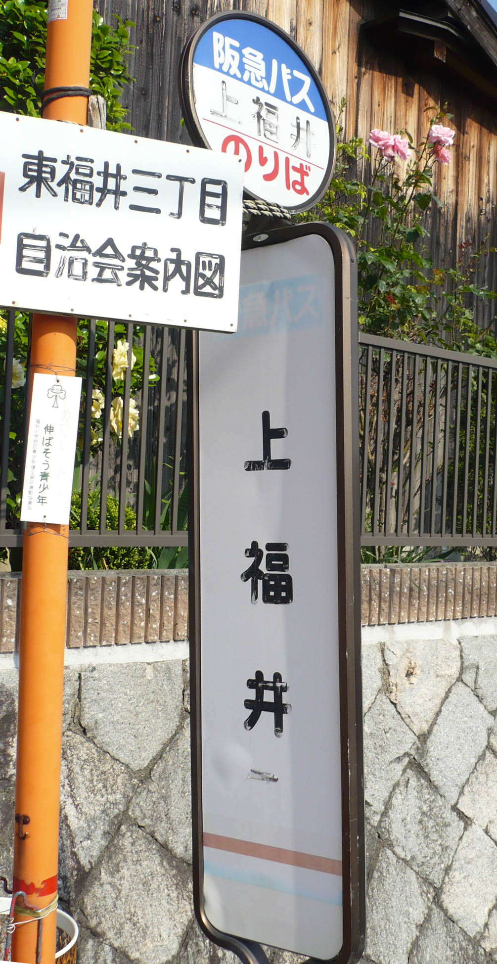 阪急バス停